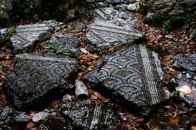 Фрагменти настінного мозаїки в Олімпосе